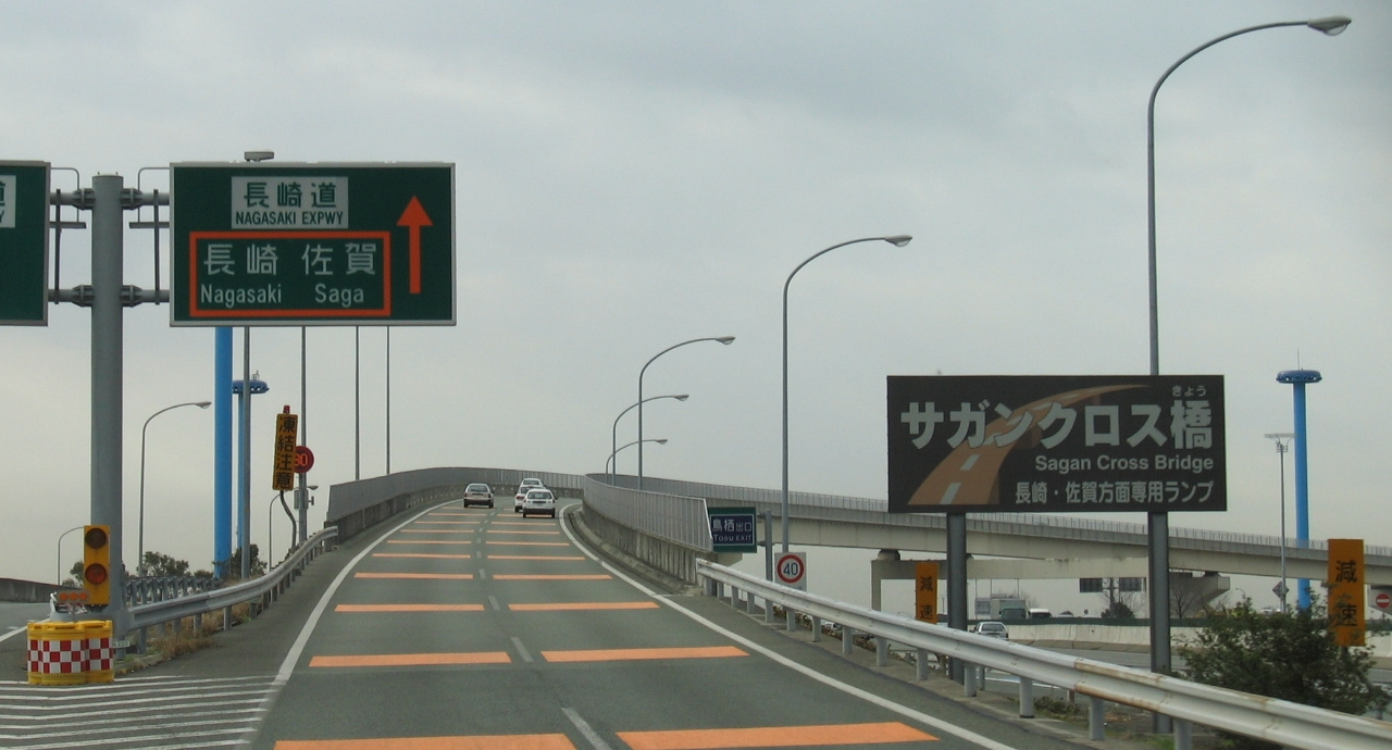 九州自動車道下り線とja:長崎自動車道長崎方面を通る、鳥栖ジャンクション内のサガンクロス橋